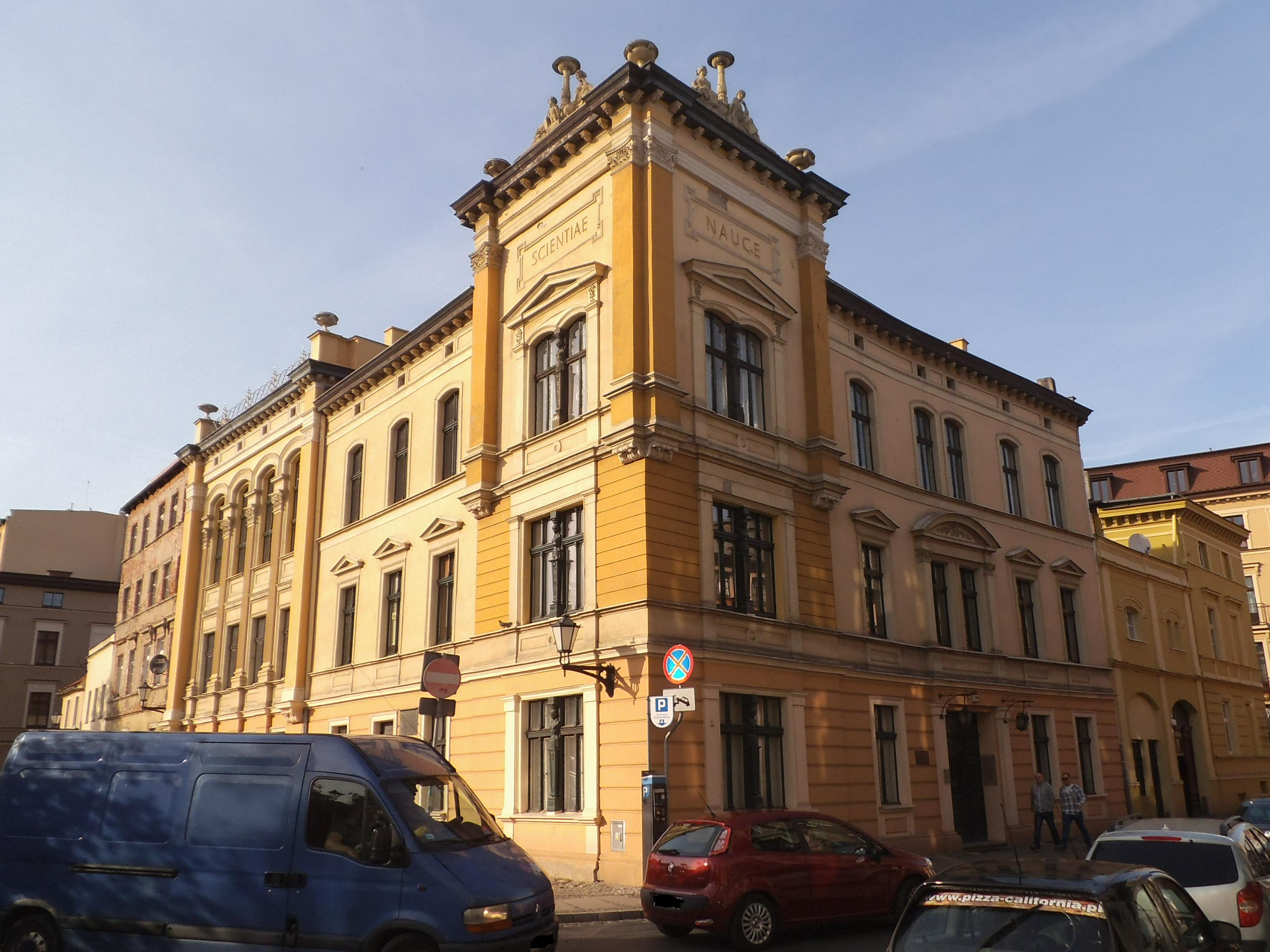 Towarzystwo Naukowe w Toruniu